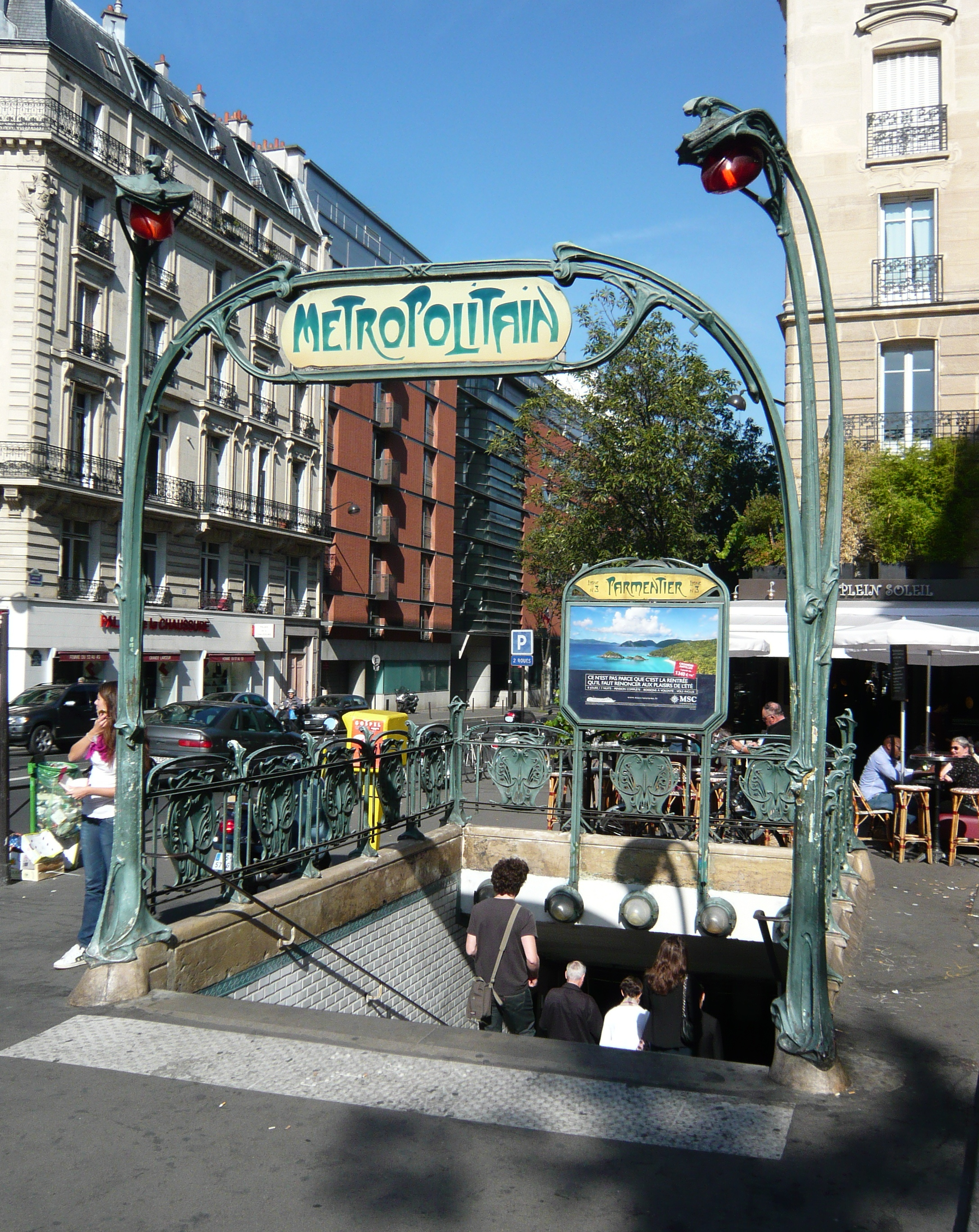 Edicule Guimard Métro Parmentier